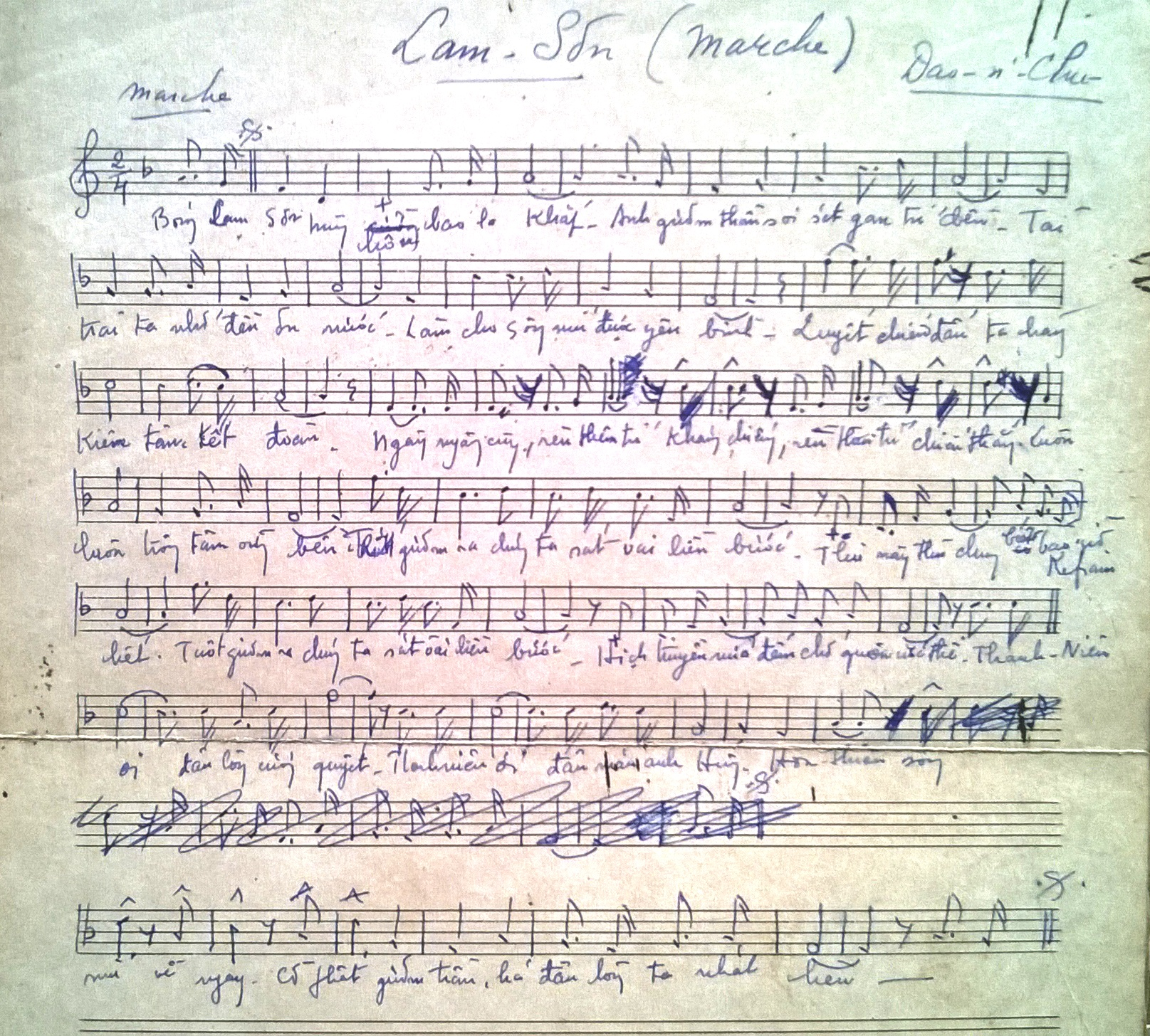 Lam Sơn